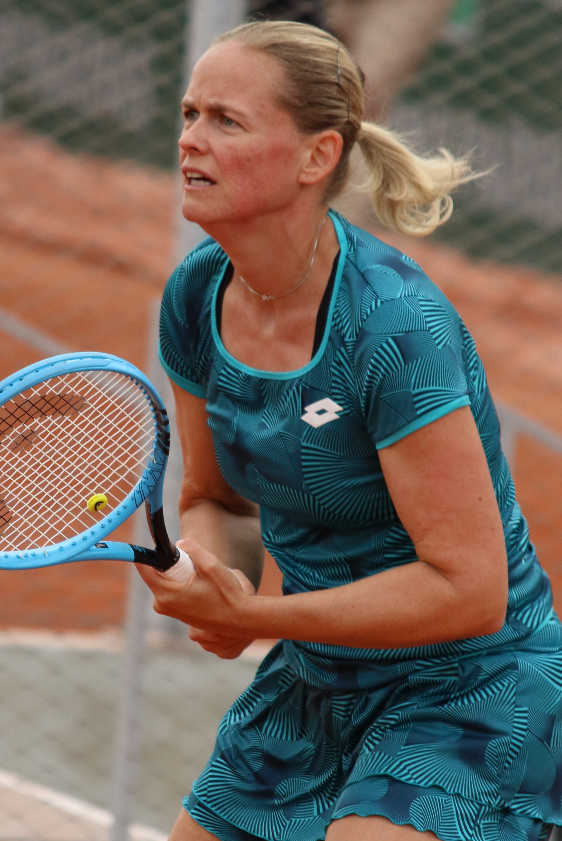 Groenefeld RG19 (16)